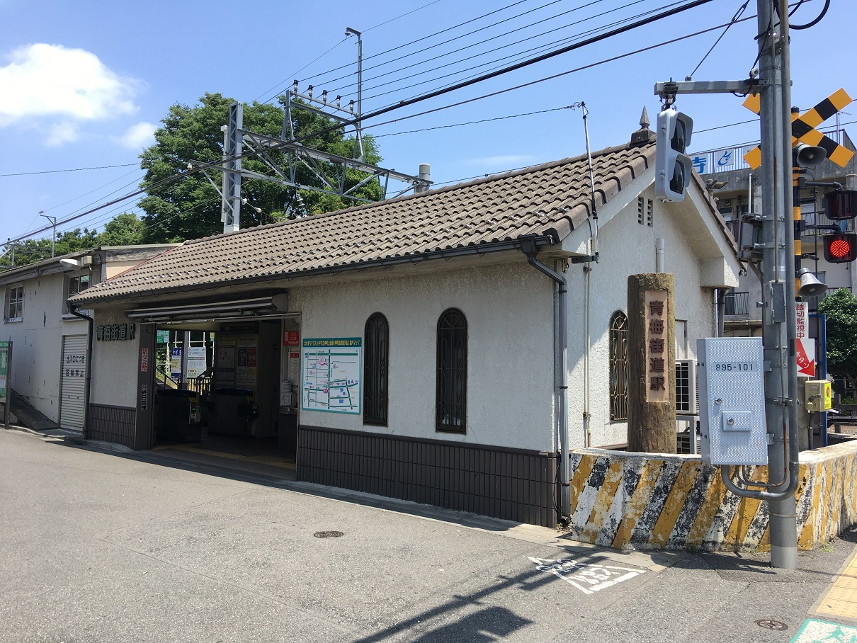 青梅街道駅舎